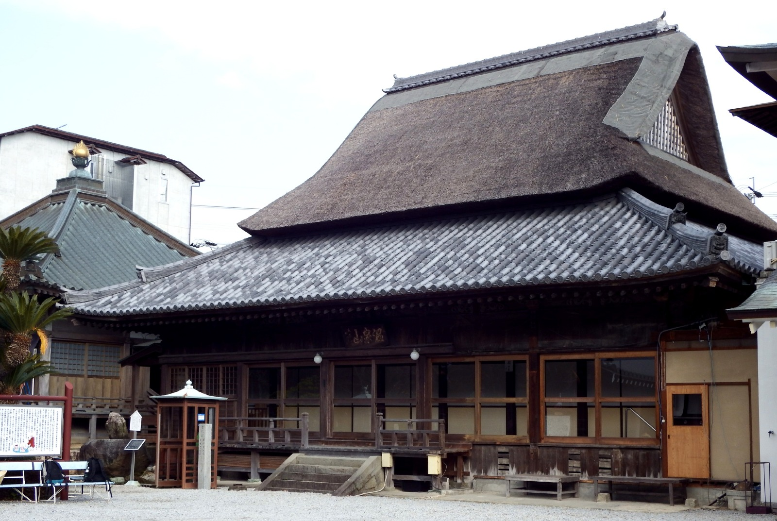 安楽寺の方丈